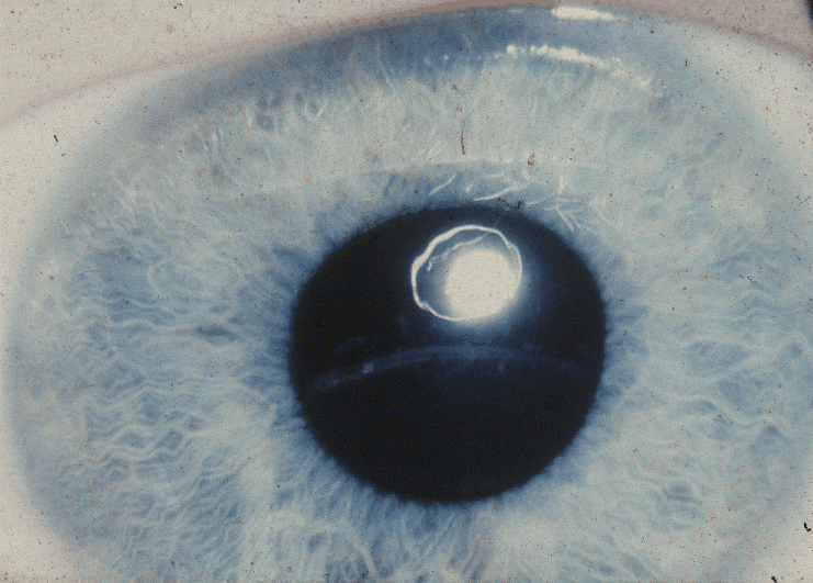 Homocystinuria